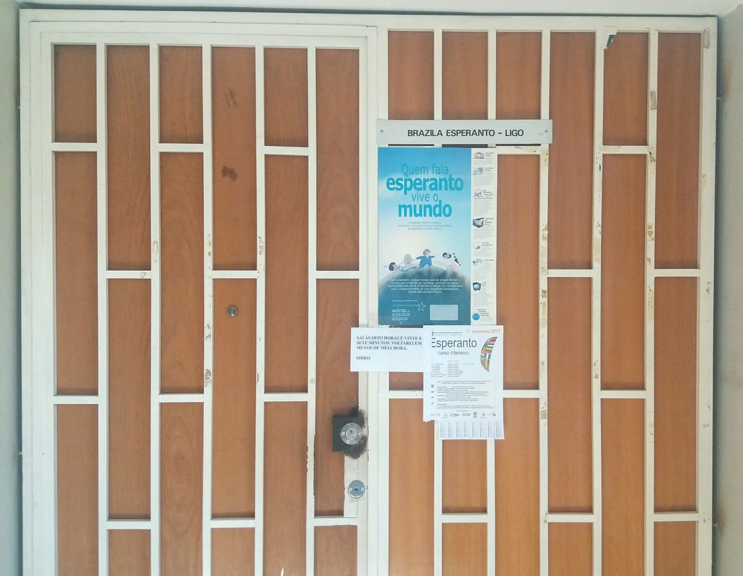 Enirpordo de Brazila Esperanto-Ligo